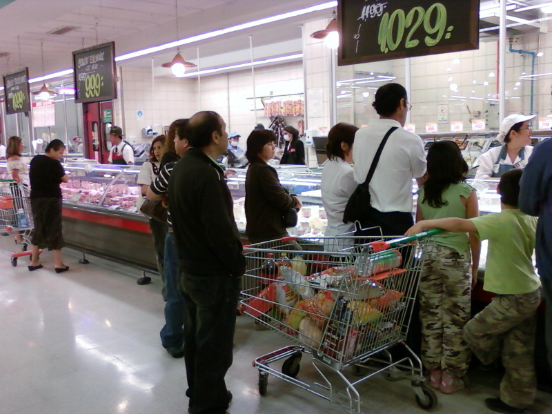 Supermercado Jumbo de Rancagua tras el brote de listeriosis en Chile. Tras conocerse casos en cecinas, el público las cambió por los quesos, como se ve en la imagen.